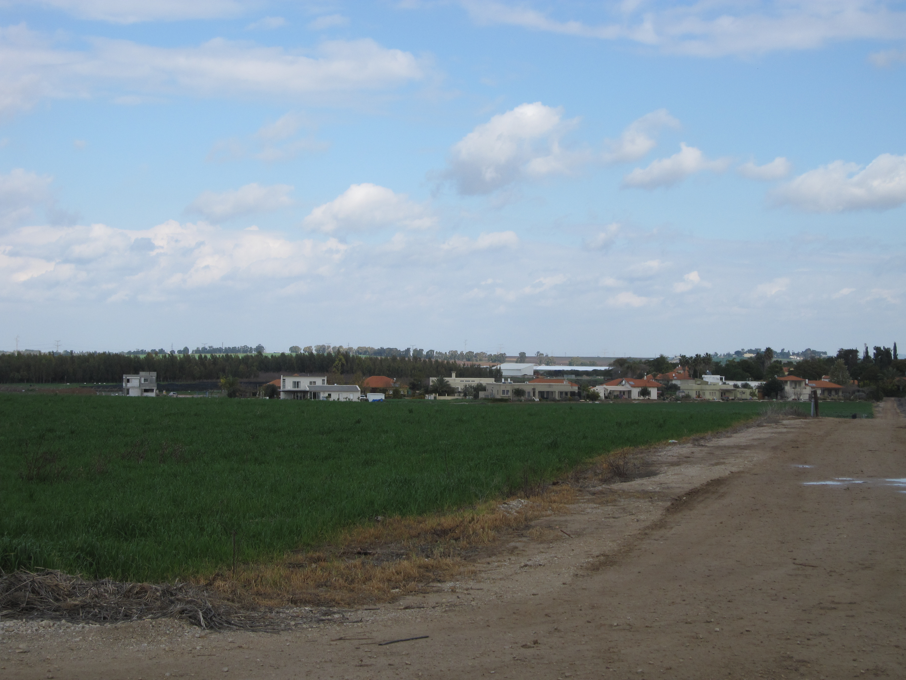 ניר בנים